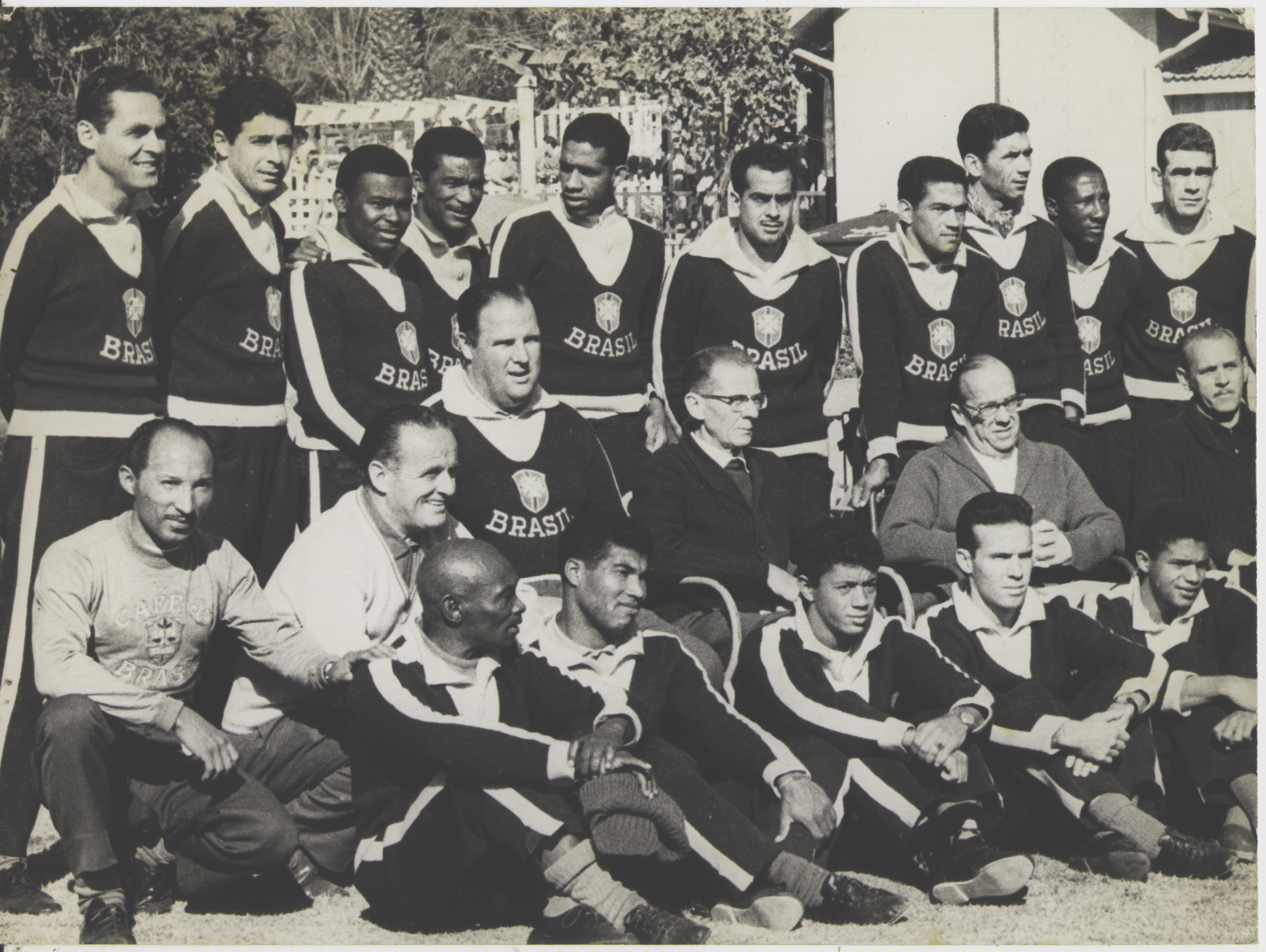 Obra que integra o acervo do Museu Paulista da USP. Coleção Werner Haberkorn